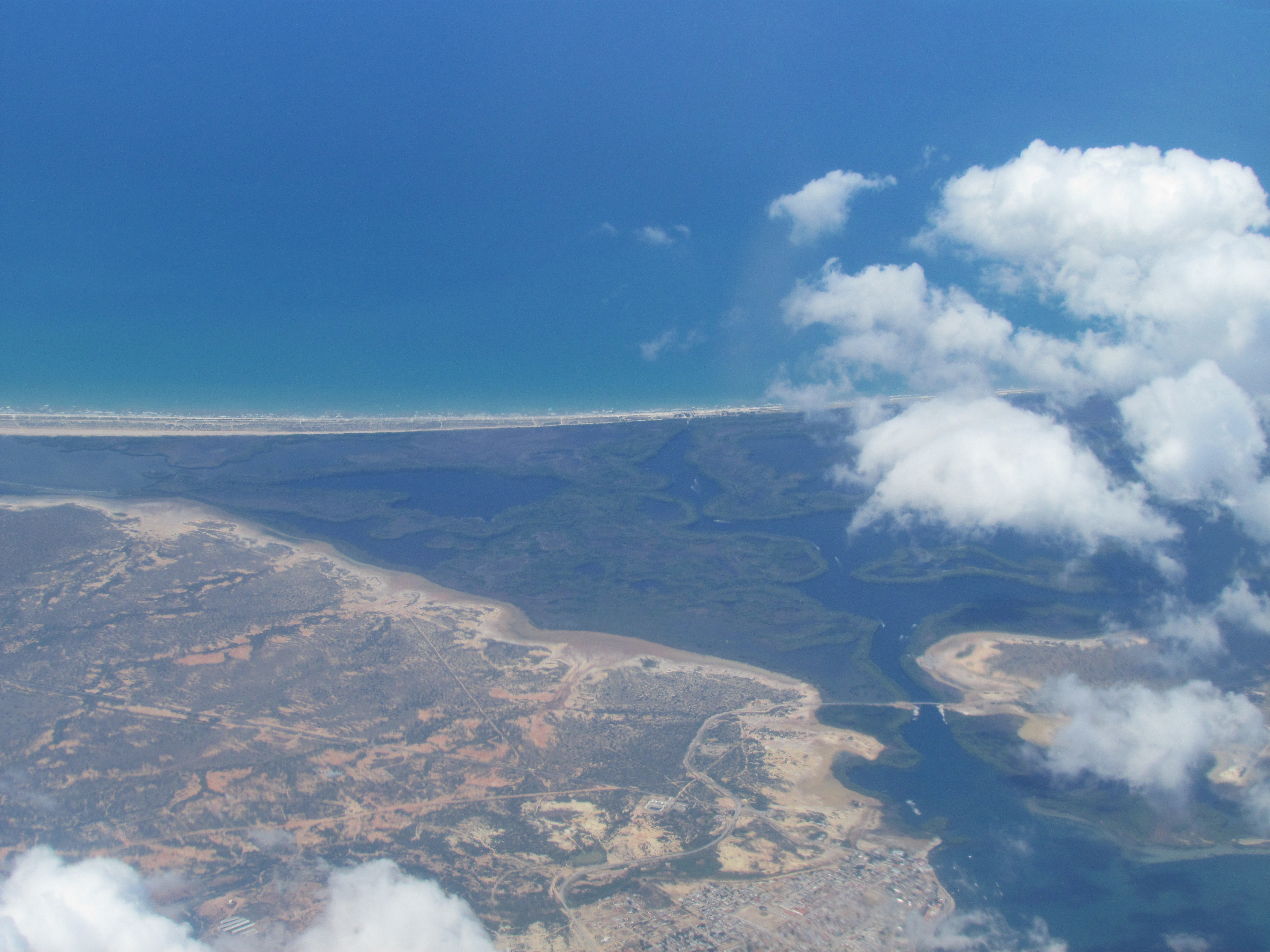 Laguna de la Restinga